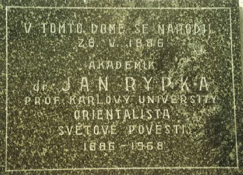 Pamětní deska orientalisty Jana Rypky na rodném domě v Kroměříži